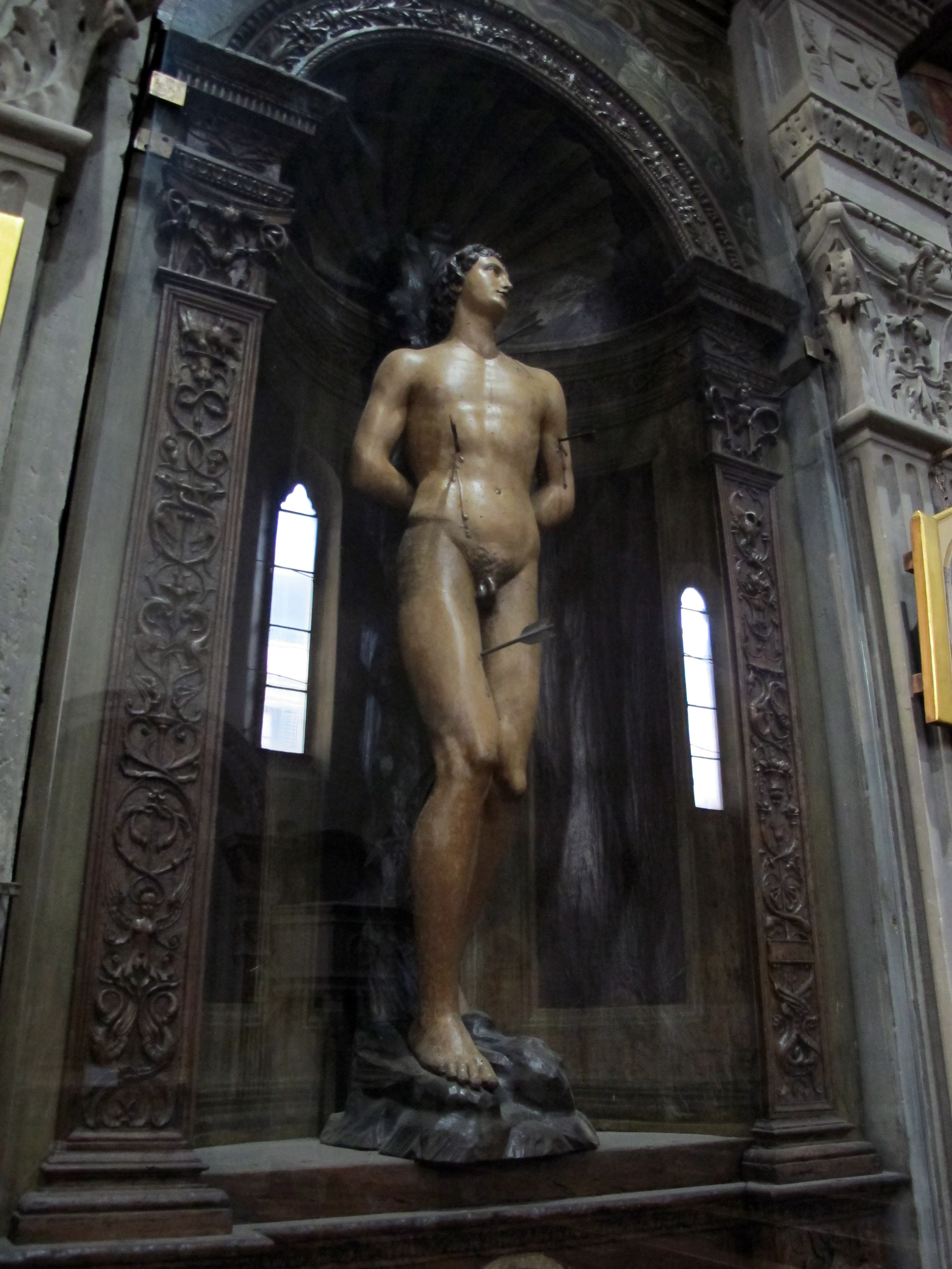 S. ambrogio, fi, interno, tabernacolo di s. sebastiano di leonardo del tasso